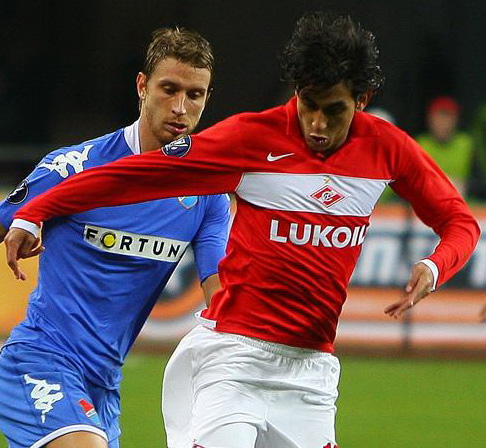 Kristian Maidana